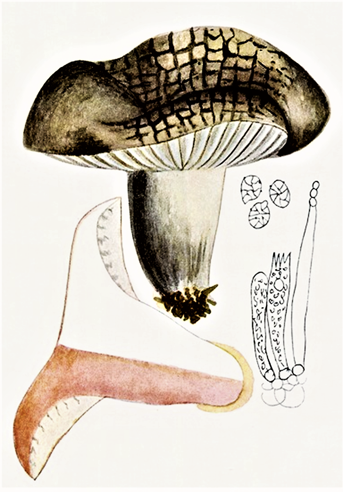 Giacomo Bresadola: Russula nigricans (Bull., 1788) Fr. (1838)